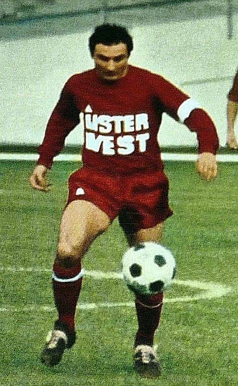 Fleury di Nallo en 1972, 'Ageducatifs Football 1972 - 1973', Panini figurina n°75.